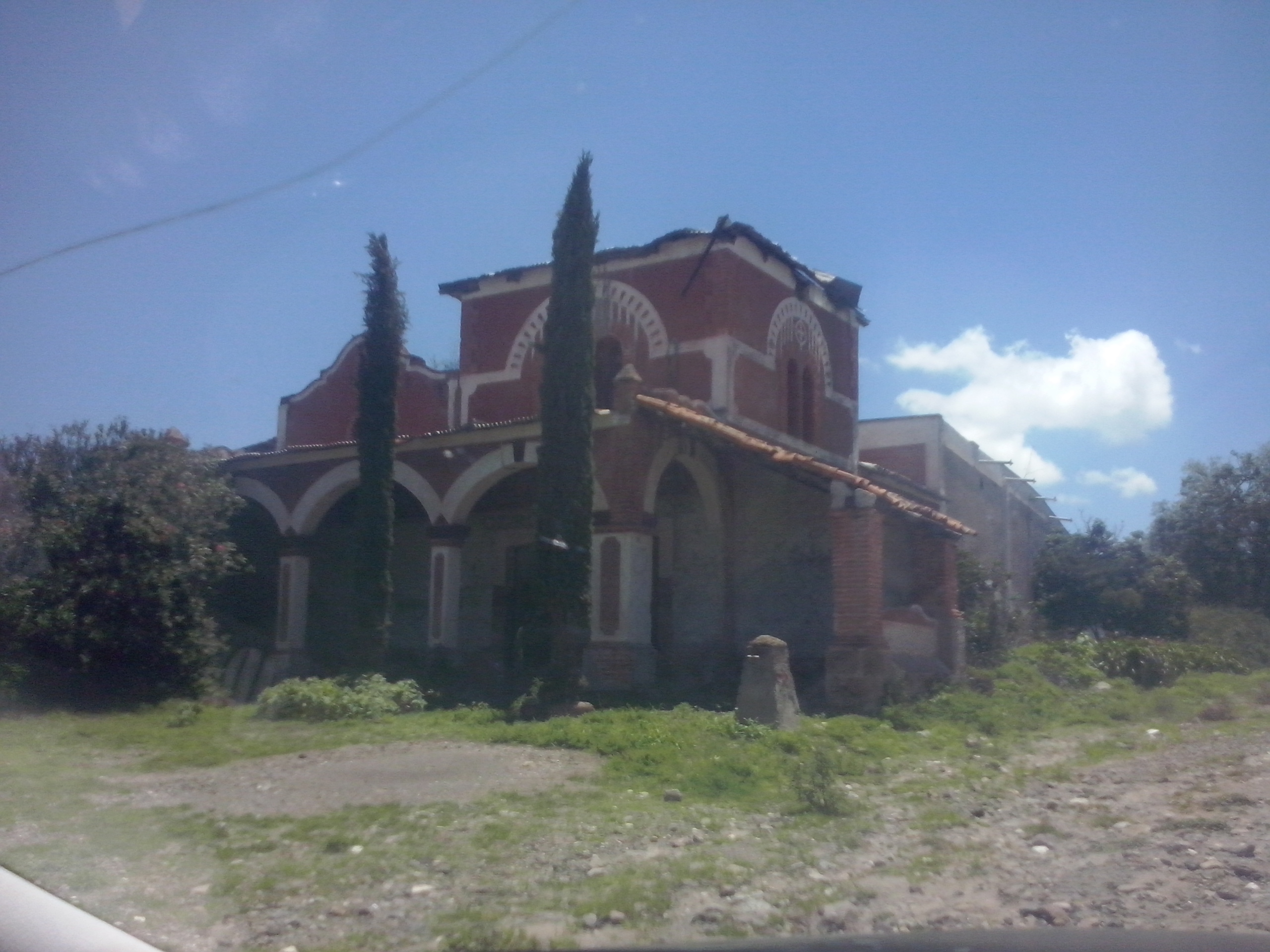 Hacienda abandonada en la comunidad de El Rincón en el municipio de El Arenal estado de Hidalgo, México.